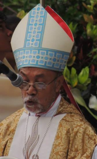 Alberto Ricardo da Silva, Bischof von Dili. Rede zum 50jährigen Jubiläum der Pfarrei Becora